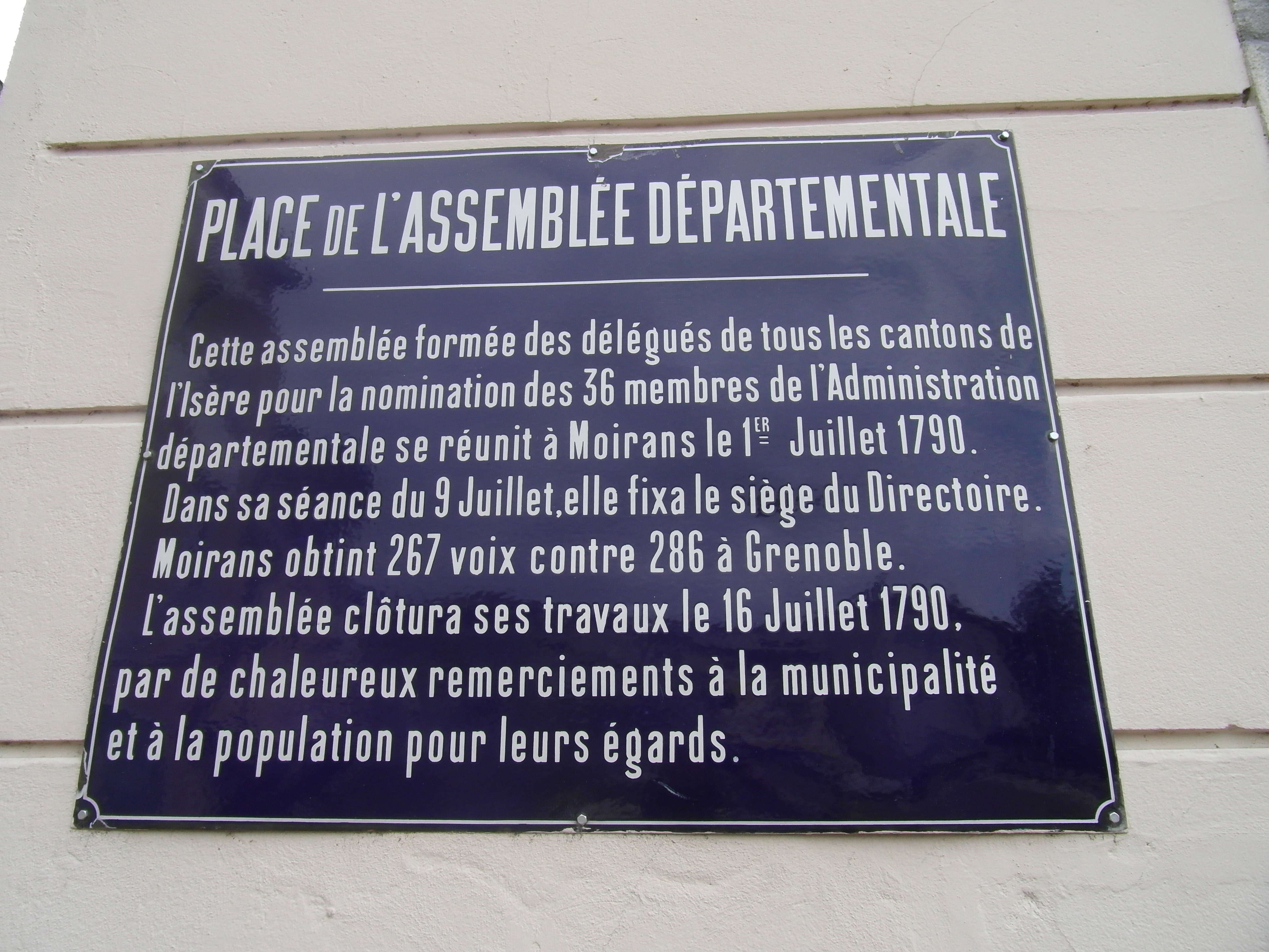 Plaque commémorative de 1790 sur la façade de la mairie de Moirans